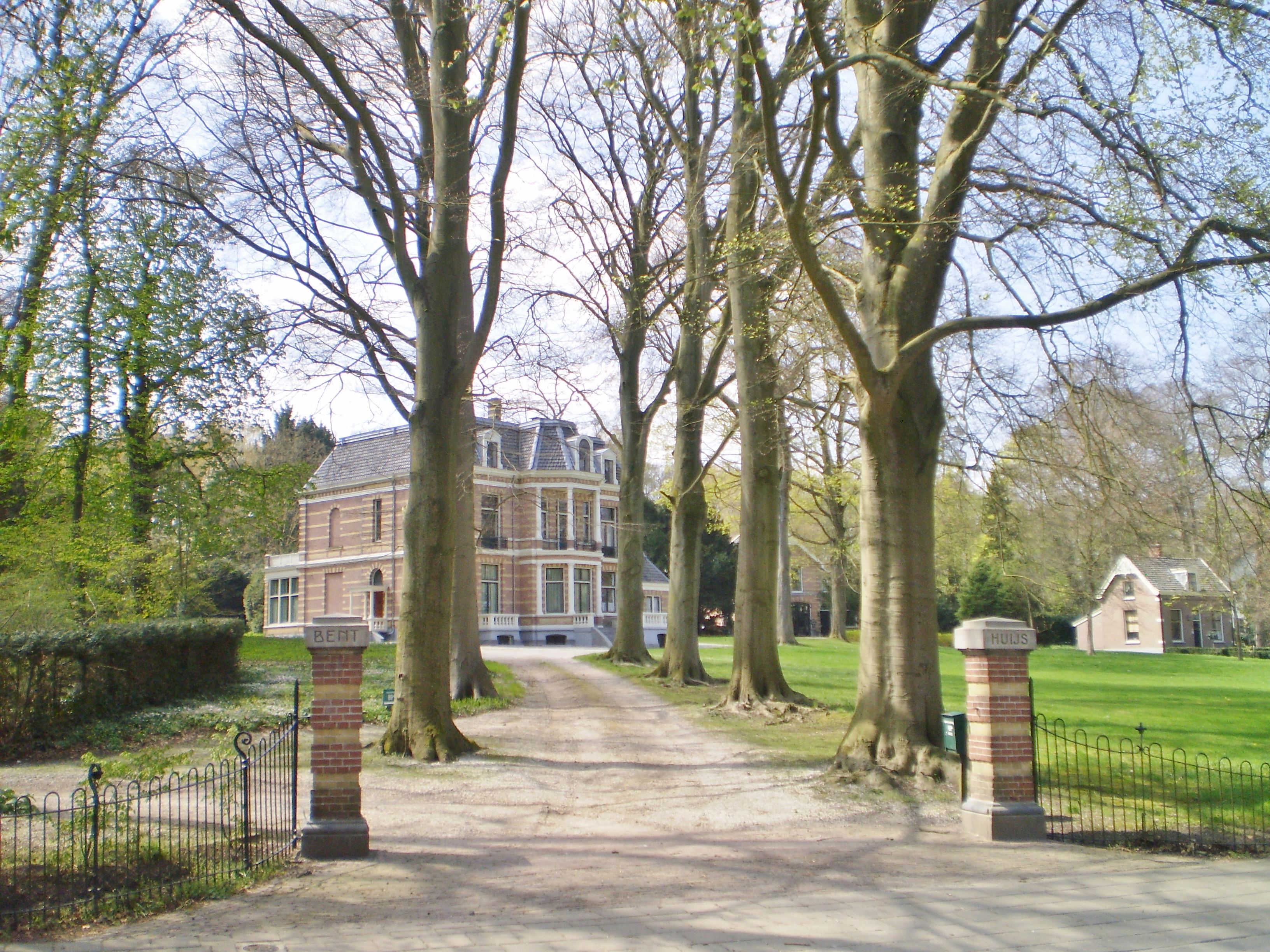 Vanaf de Eemnesserweg